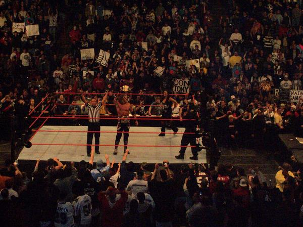 edge